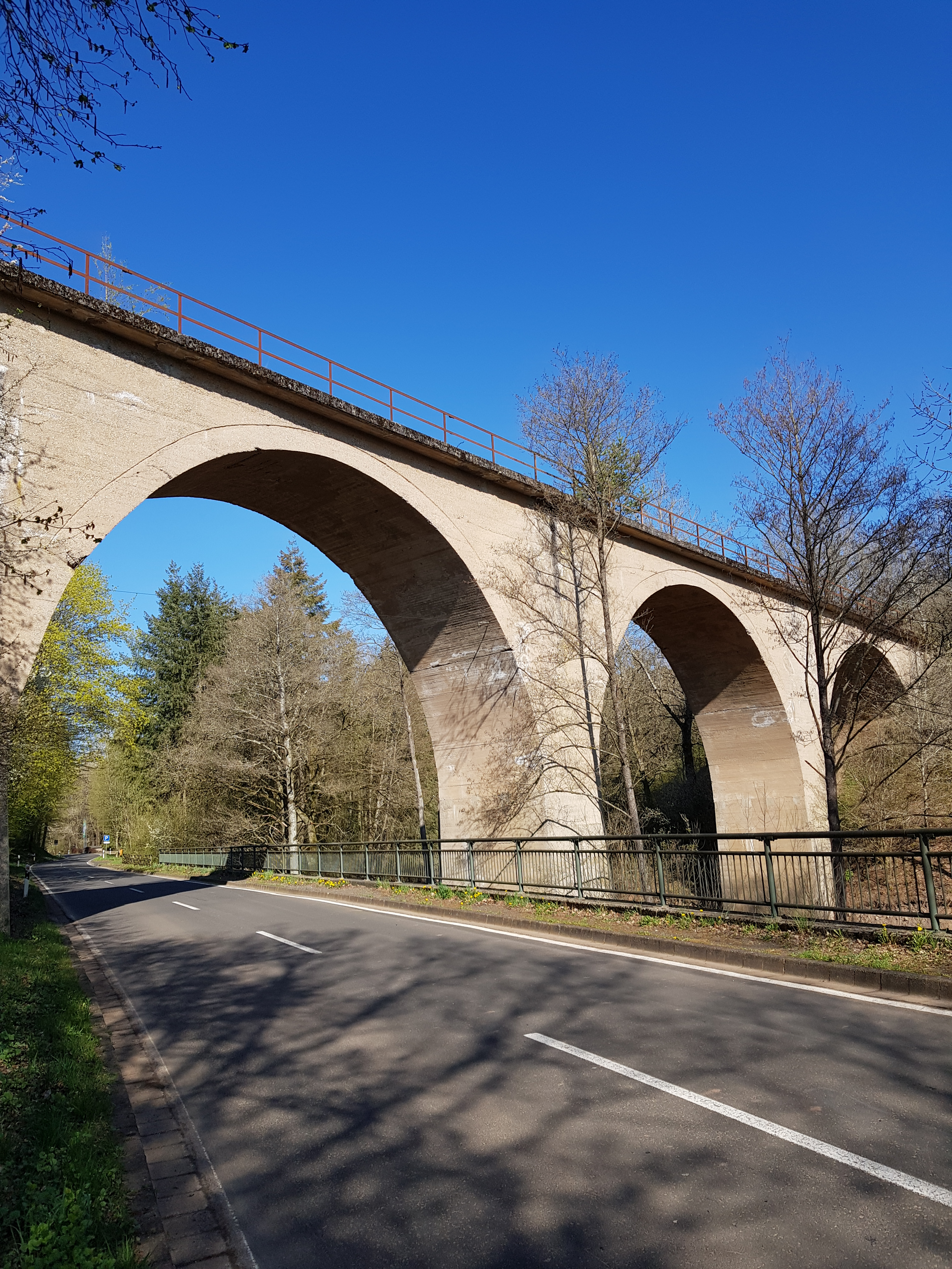 Die K 116 unterquert das Bierbachtalviadukt